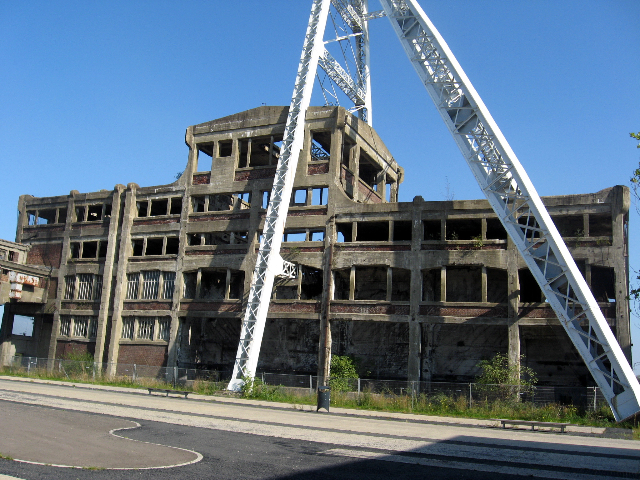 Ontvangstgebouw van de Steenkoolmijn Waterschei in Genk